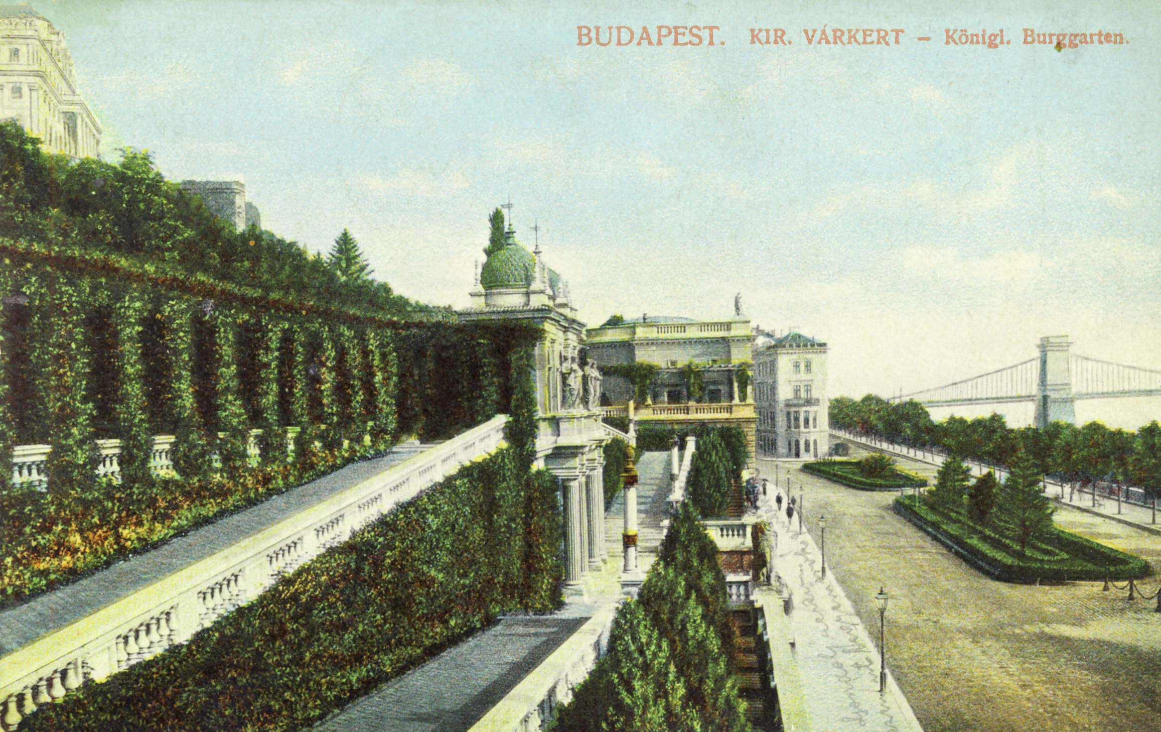 Budapest, Várnegyed, Várkert (képeslap)